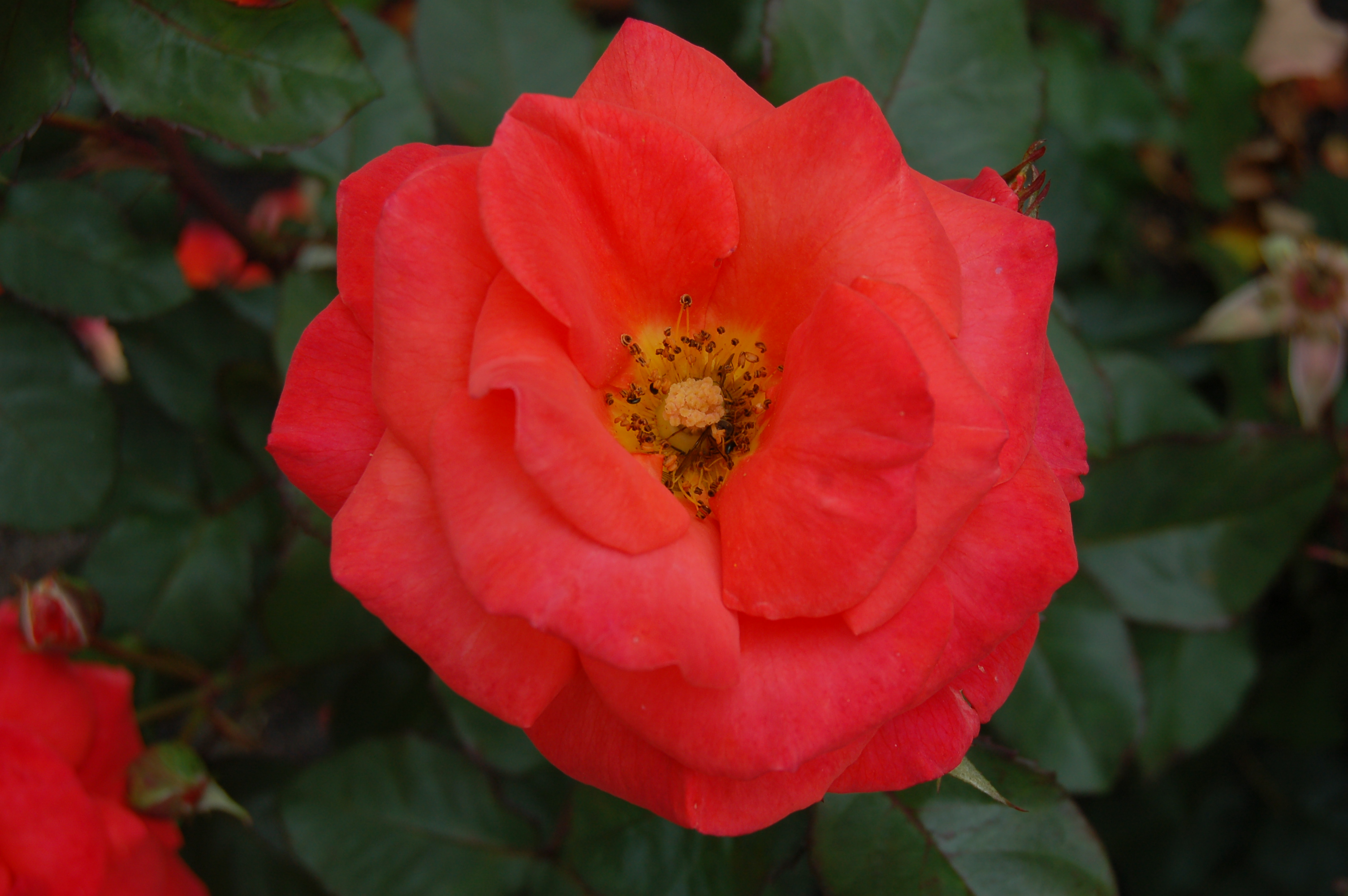 Rosa 'Mireille Mathieu'